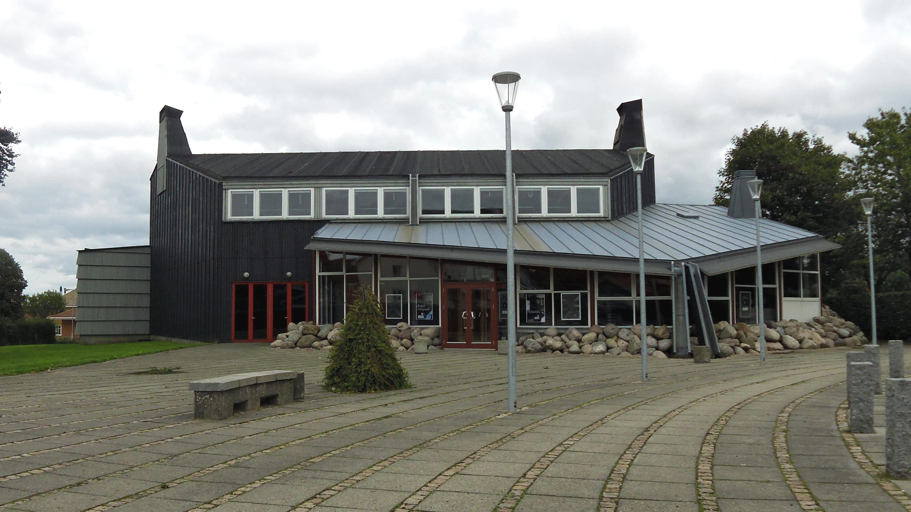 Teater- & Musikhuset i Toftlund